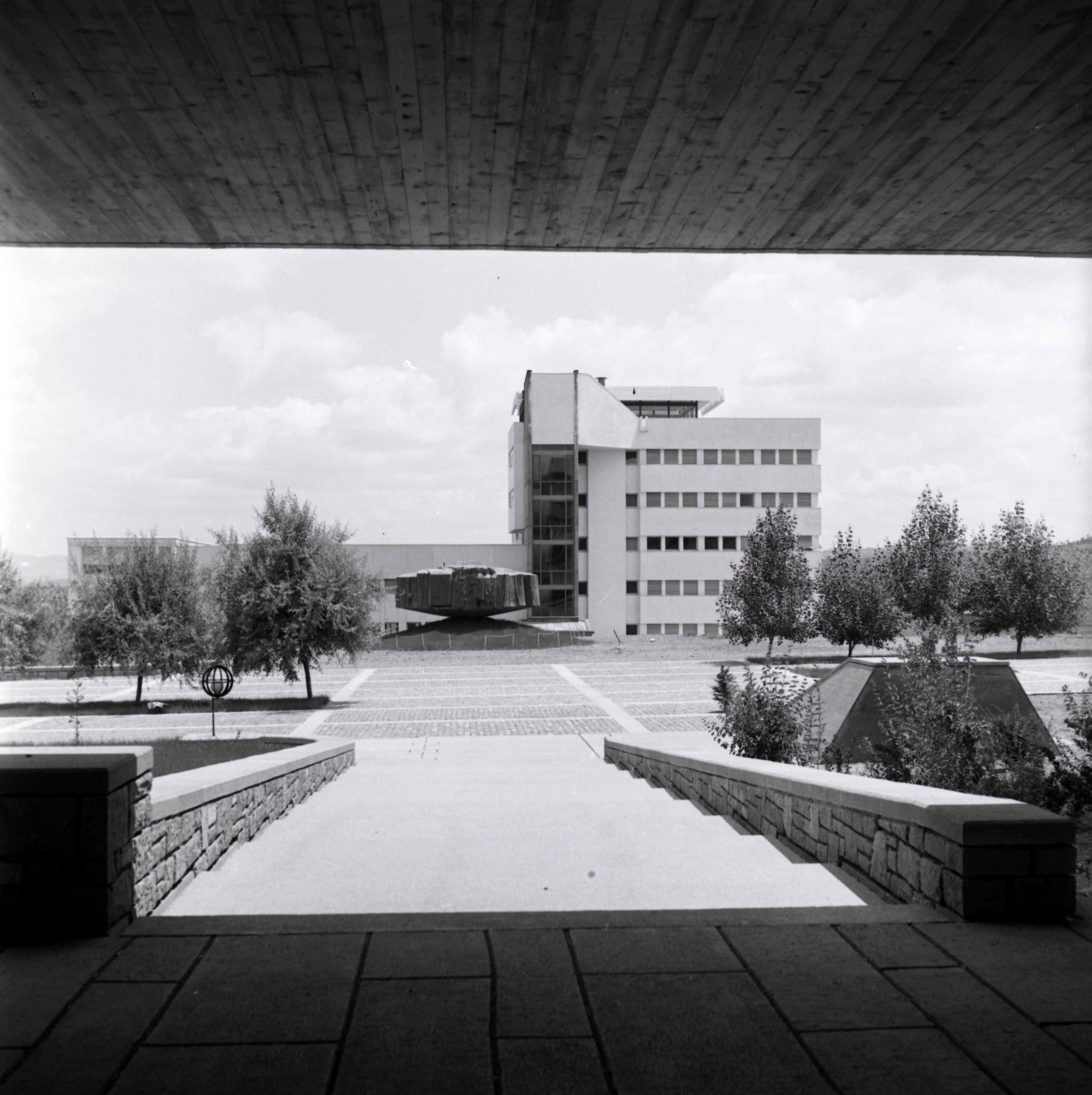 METU, Rectorate Building, sider facade, 1961-1980 SALT Research, Altuğ-Behruz Çinici Archive ODTÜ Rektörlük binası, yan cephe, 1961-1980 SALT Araştırma, Altuğ-Behruz Çinici Arşivi